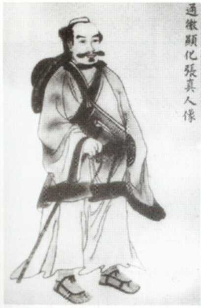 le sage Chang San-feng Cette œuvre fait partie du domaine public, soit parce que son auteur a renoncé à ses droits (copyright), soit parce que ses droits ont expiré. Elle est donc librement diffusable et/ou modifiable. conforme